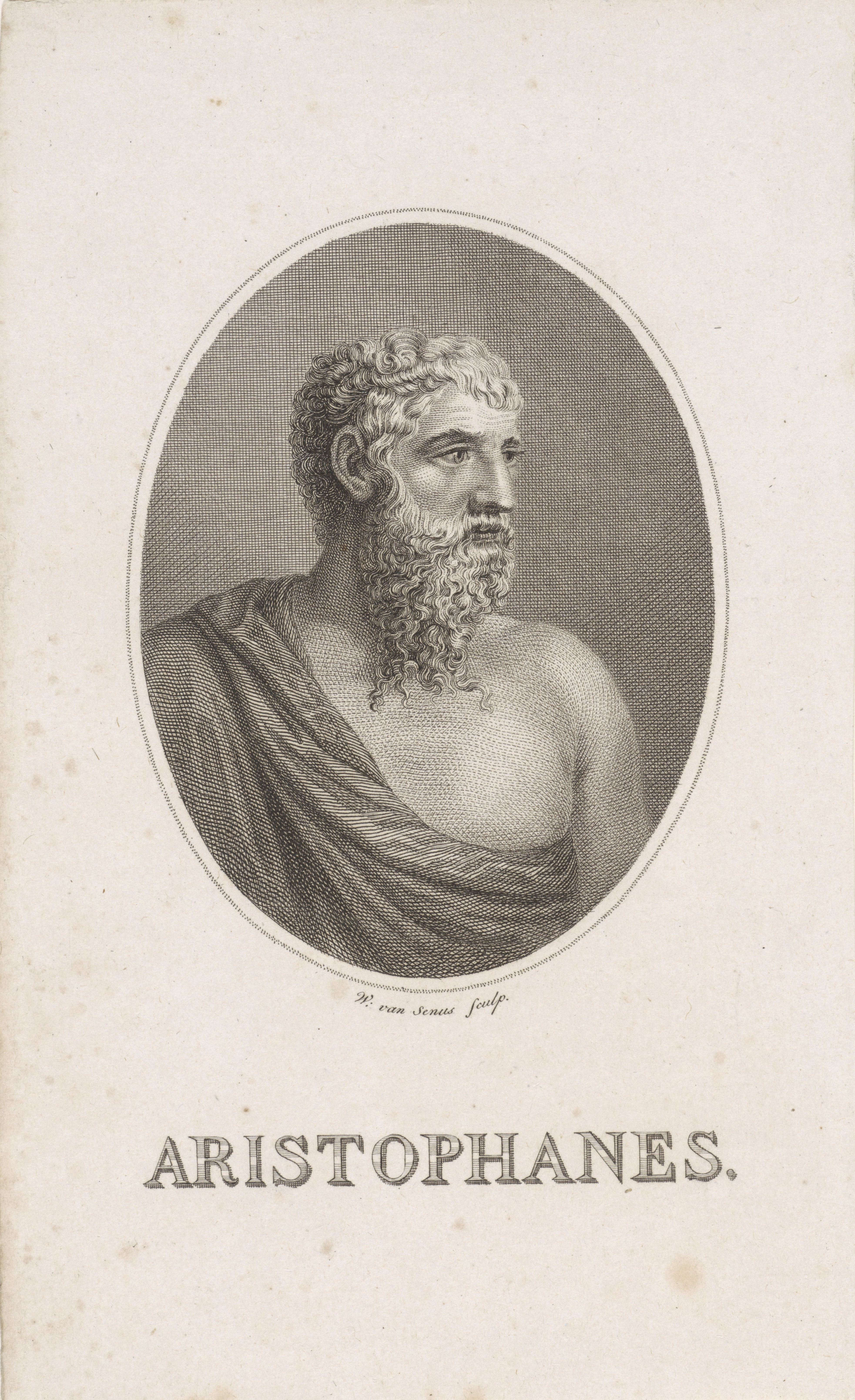 IdentificatieTitel(s): Portret van AristophanesObjecttype: prent Objectnummer: RP-P-1907-4883Opschriften / Merken: verzamelaarsmerk, verso, gestempeld: Lugt 2228Omschrijving: Portret van de Griekse dichter Aristophanes.VervaardigingVervaardiger: prentmaker: Willem van Senus (vermeld op object)Plaats vervaardiging: NederlandDatering: 1783 - 1851Fysieke kenmerken: ets en gravureMateriaal: papier Techniek: etsen / graveren (drukprocedé)Afmetingen: blad: h 220 mm × b 135 mmOnderwerpWie: AristophanesVerwerving en rechtenVerwerving: aankoop 1907Copyright: Publiek domein